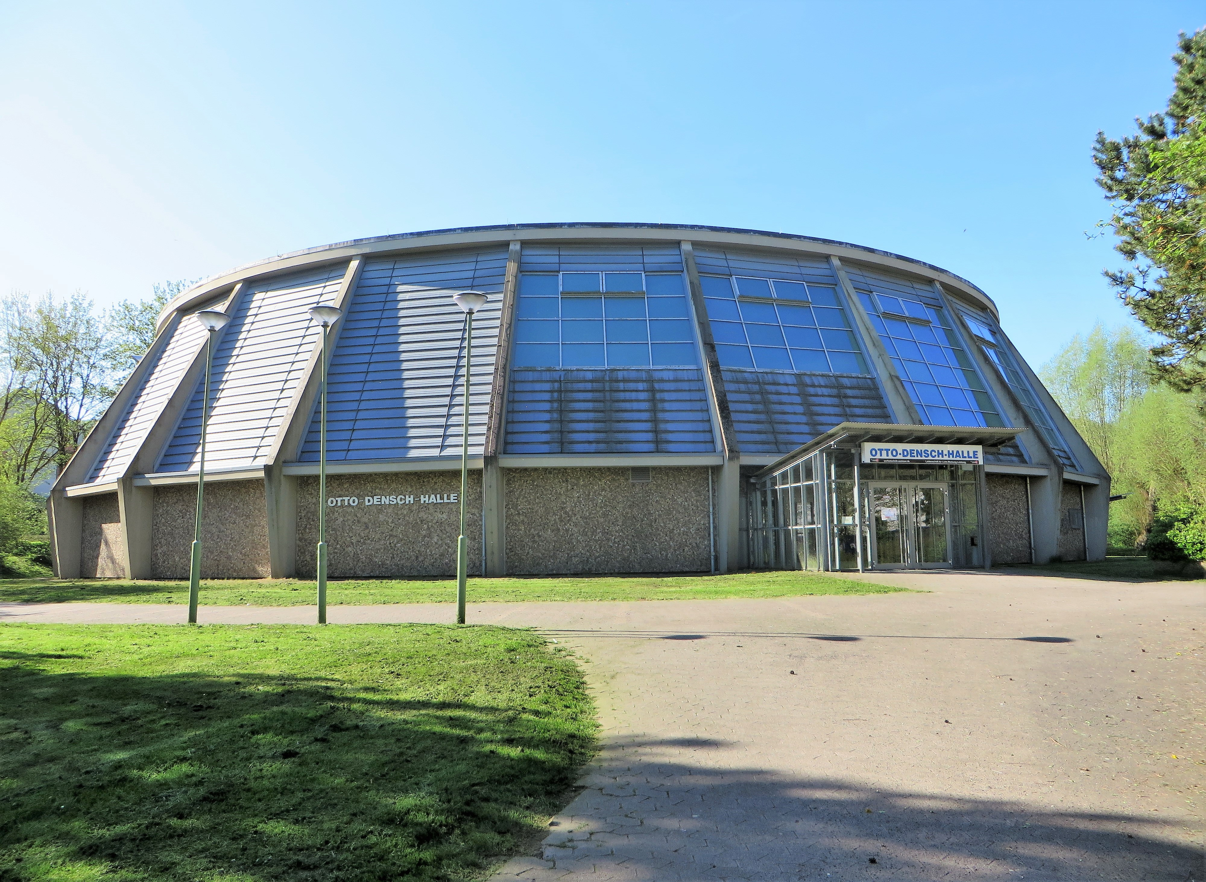 Otto-Densch-Halle in Hagen-Eilpe, Selbecker Straße 75. Eine von drei Rundsporthallen in Hagen.